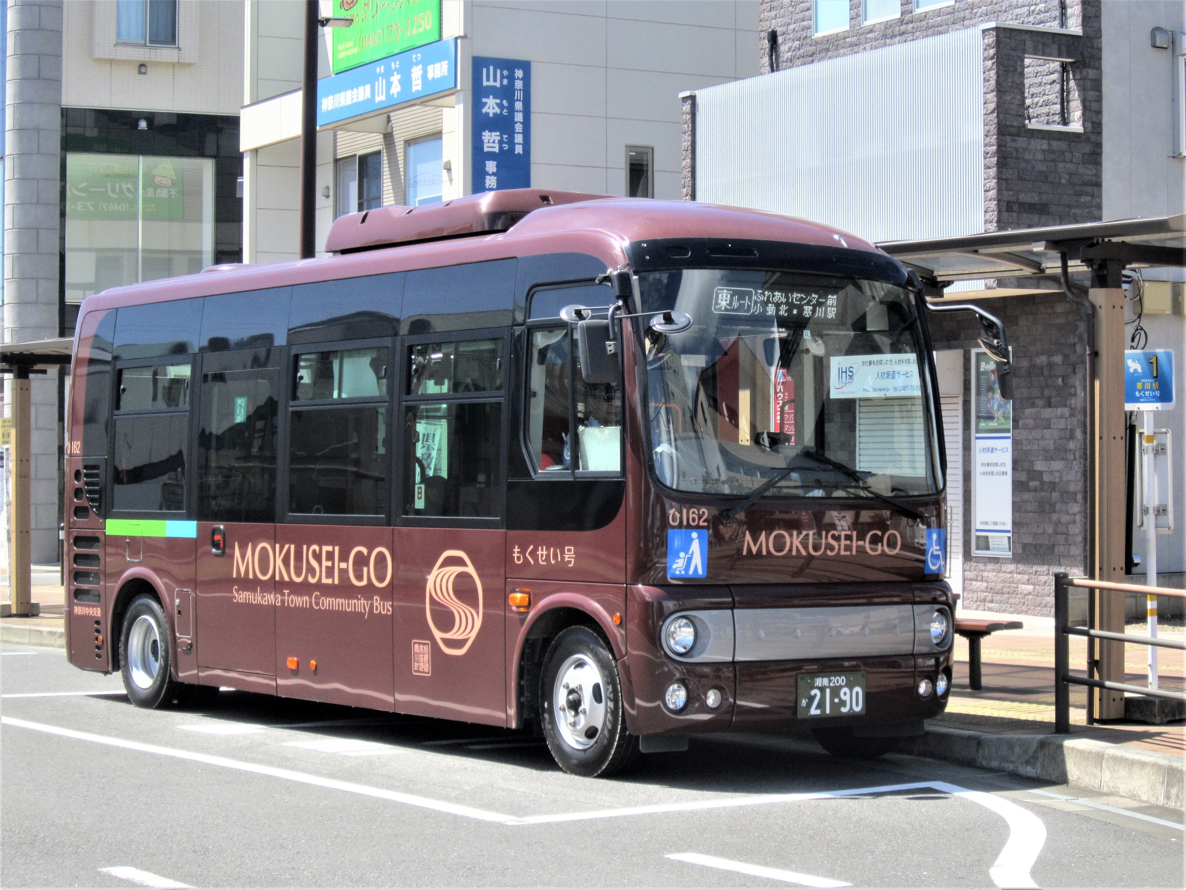 寒川駅前に停車中の寒川町コミュニティバス もくせい号